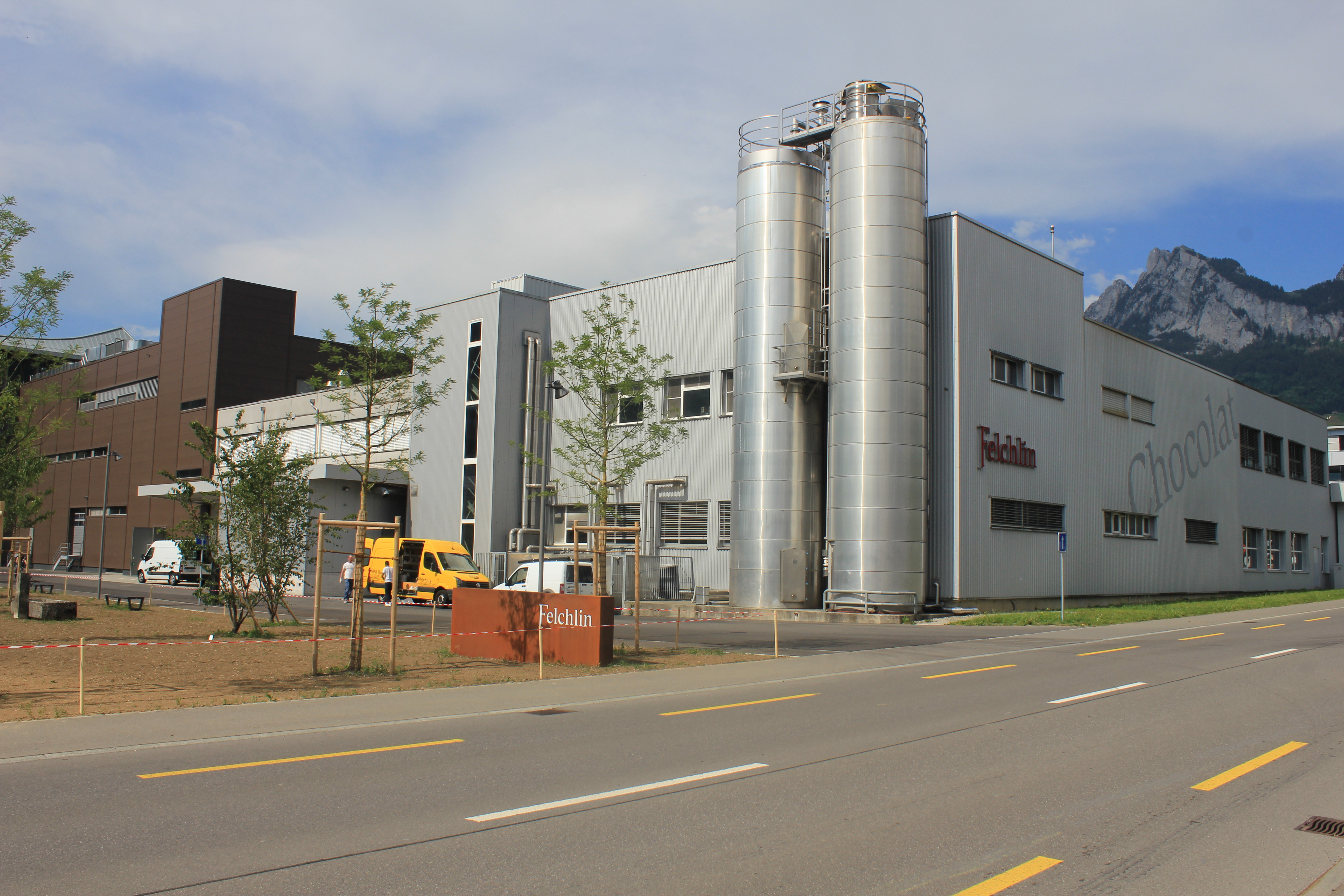 Das Fabrikgebäude des Schweizer Schokoladeunternehmens Max Felchlin AG in Ibach SZ.